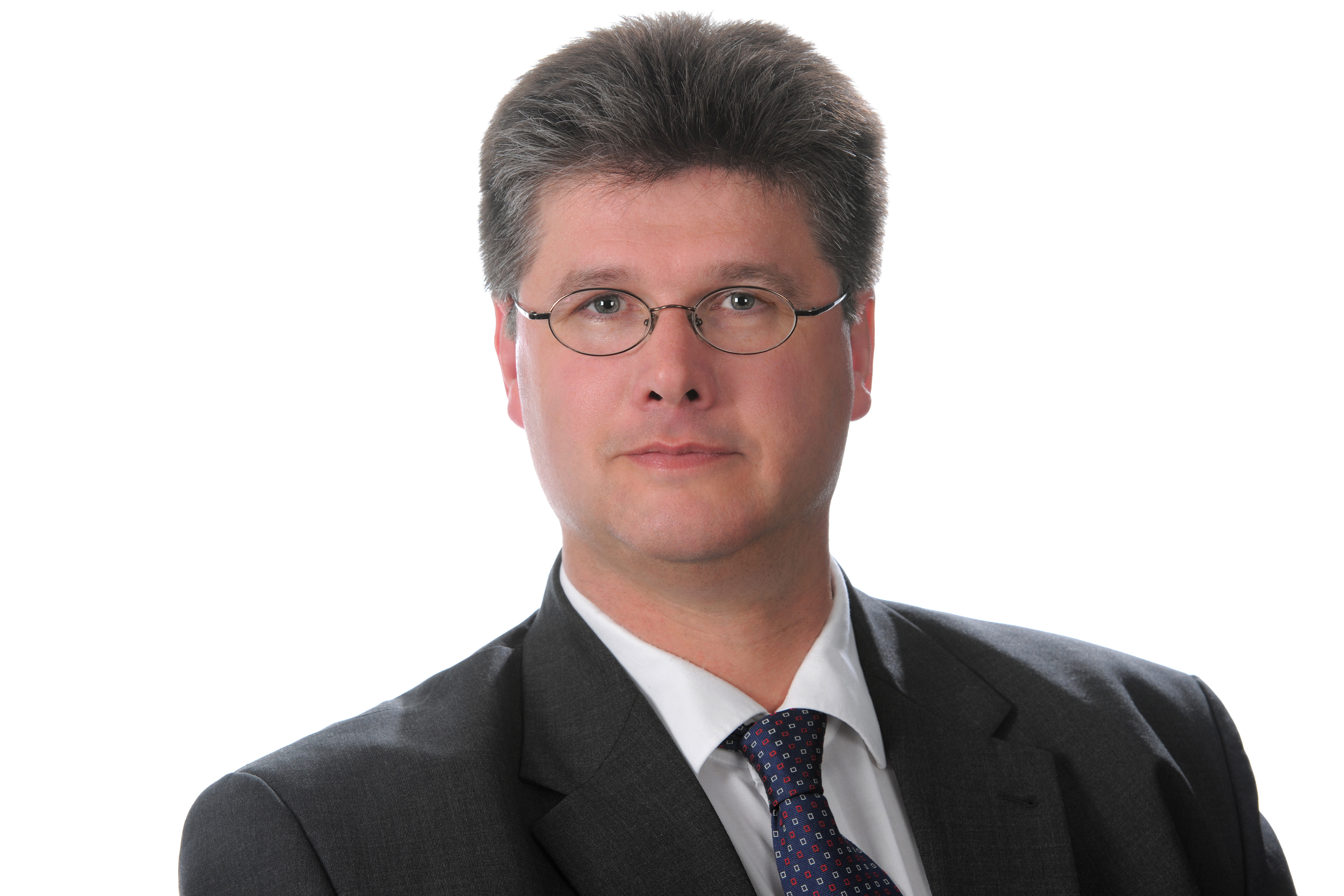 Abgeordnetenpotrait